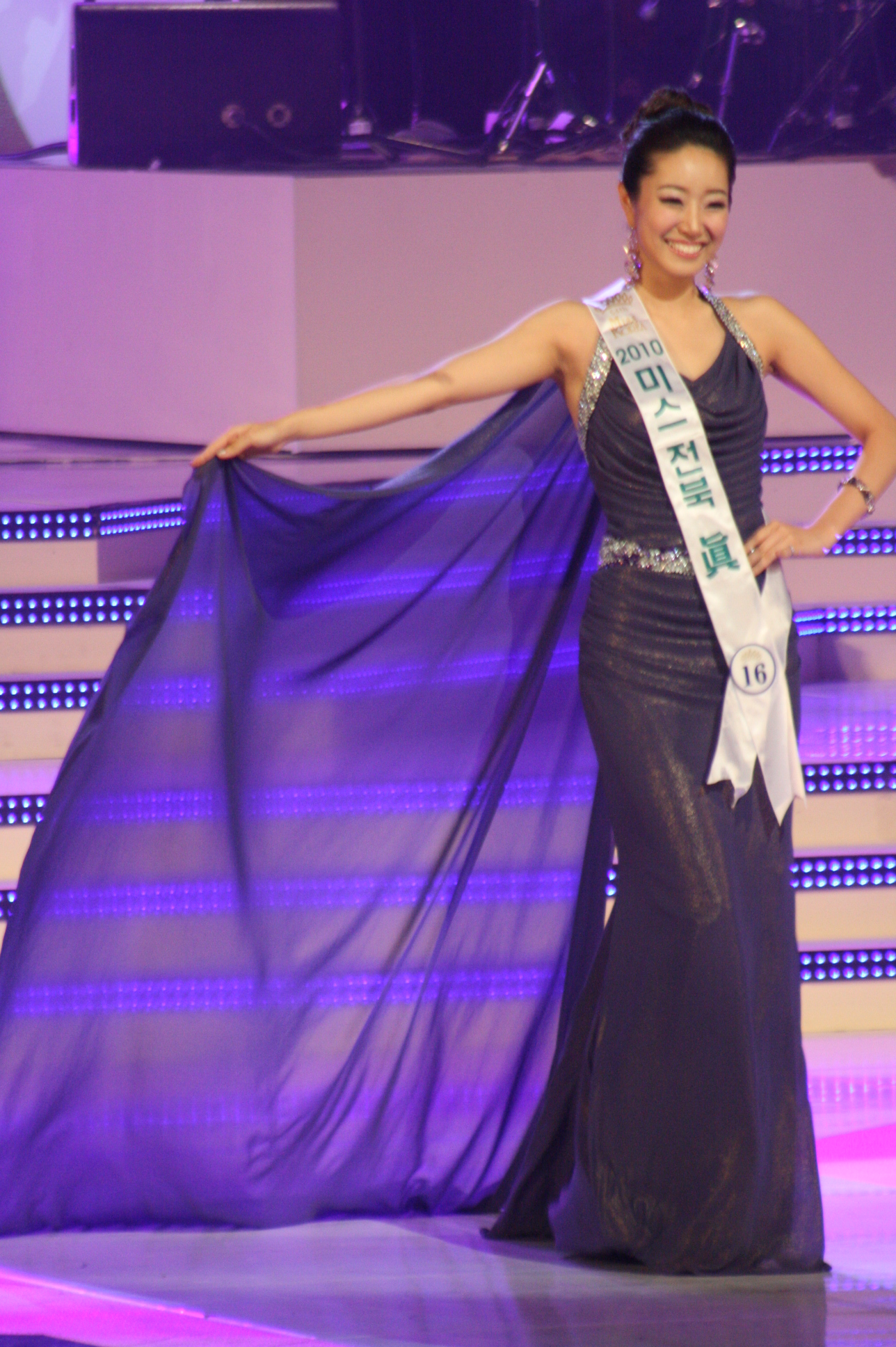 2010 미스코리아 미 알펜시아 이귀주(전북 진) 드레스 심사